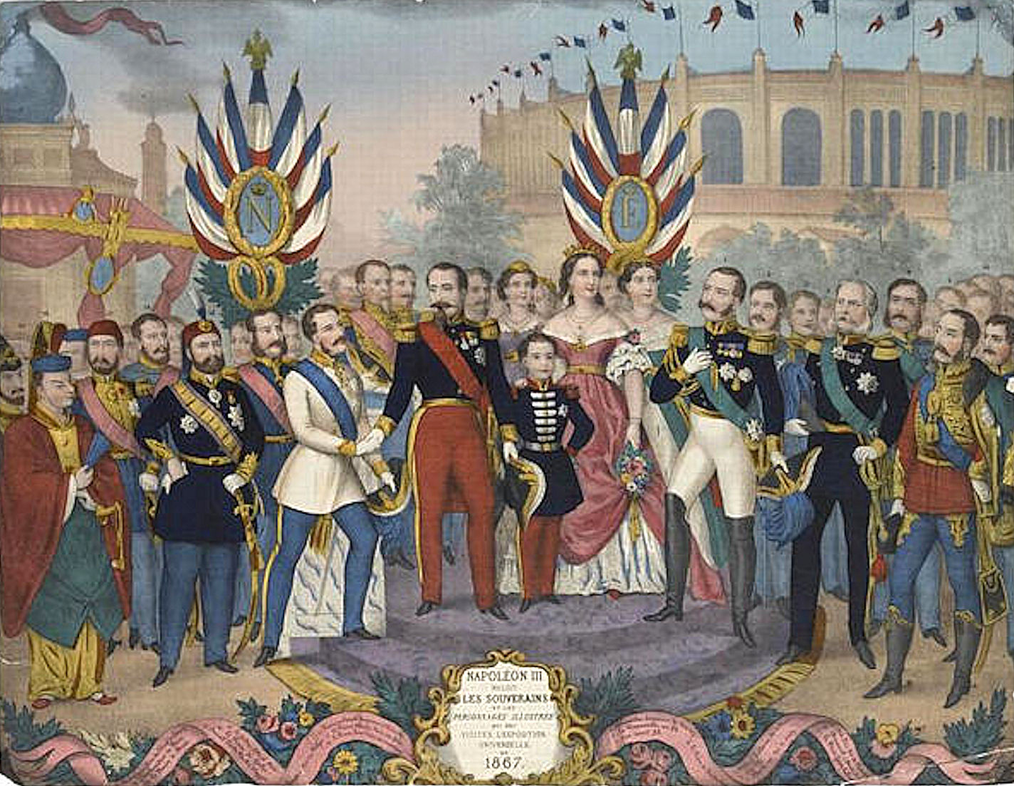 Napoléon III reçoit les souverains et les personnages illustres qui ont visité l’exposition universelle de 1867.